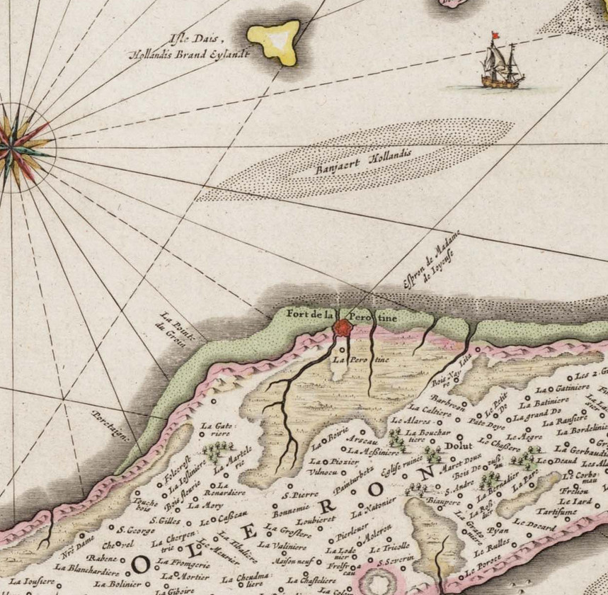 Vue détaillée d'une carte néerlandaise du XVIIème siècle